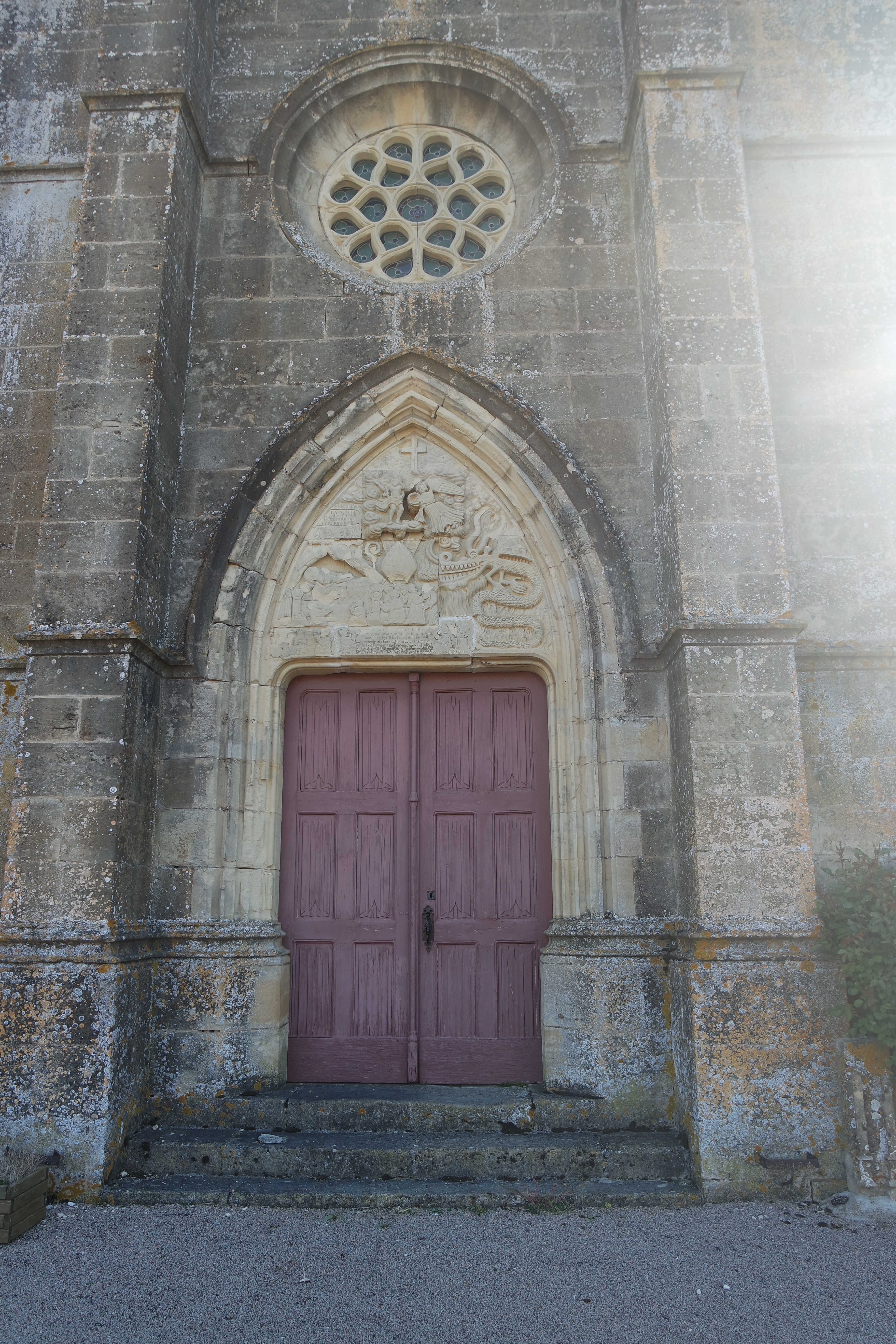 Saint Martin repoussant le démon. Tympan de l'église Saint-Martin de Neuilly. Département de la Nièvre. France.